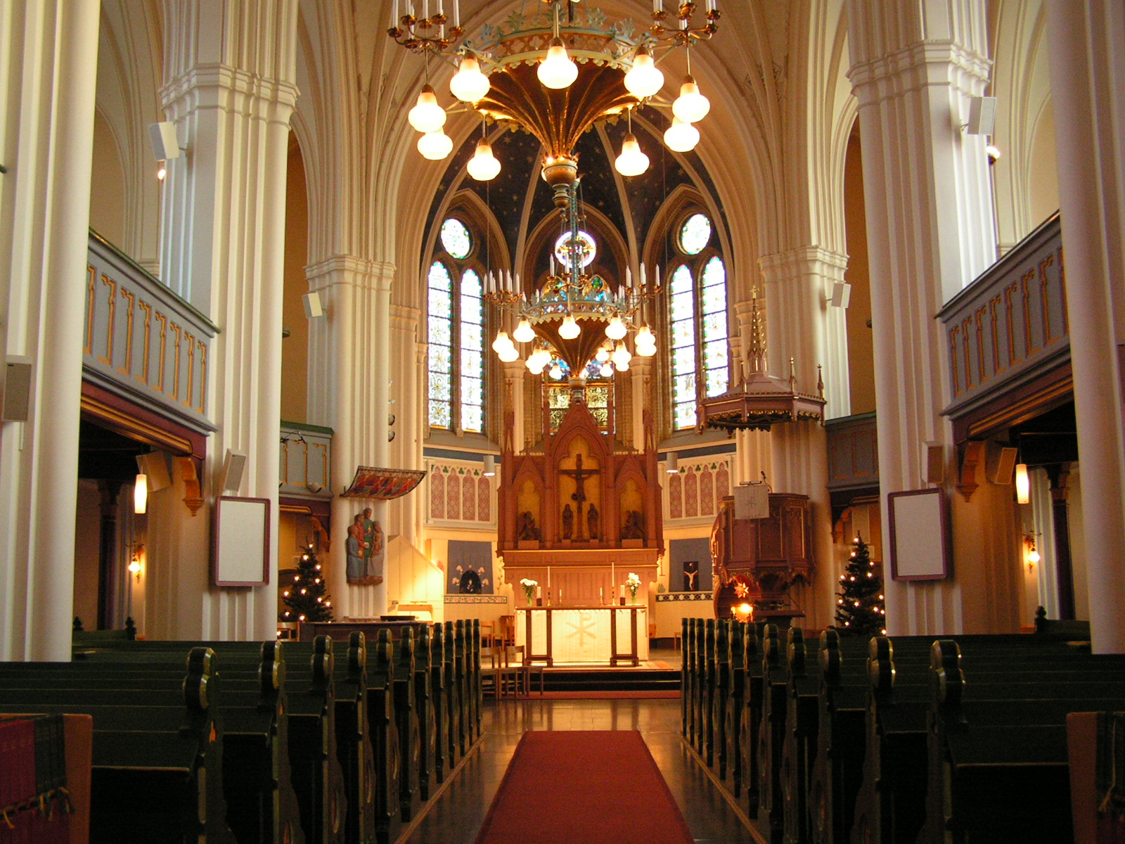 Umeå stads kyrka (mittgången)